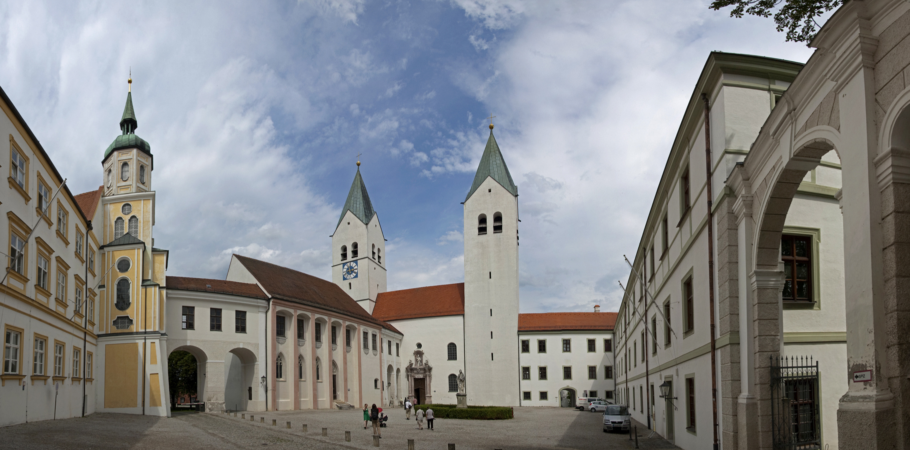 Freisinger Dom - Blick vom Innenhof